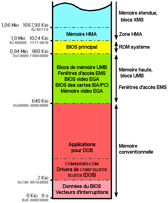 Organisation de la mémoire d'un ordinateur personnel (PC)